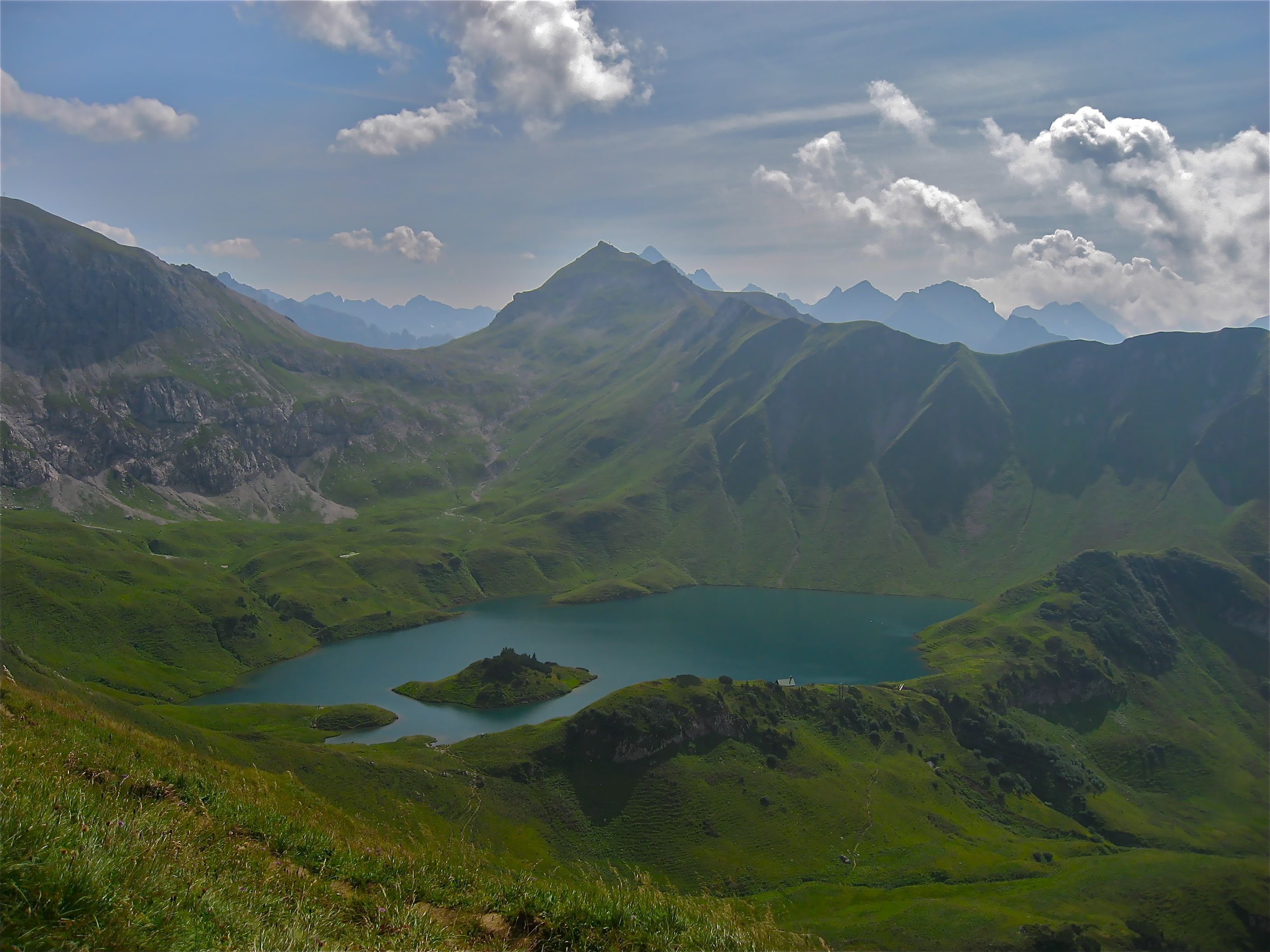 Der Schrecksee (1813 m) in den Allgäuer Alpen. Blick nach Süden. Hinter dem See ist links der felsige Aufbau des Kastenkopfes angeschnitten; rechts davon die breite Lahnerscharte (1988 m). Der Lahnerkopf (2122 m) ist der Berg rechts von der Scharte, noch im Mittelgrund des Bildes. Im Hintergrund ist unmittelbar rechts des Lahnerkopfes der Gipfel des Hochvogels (2593 m) zu erkennen.